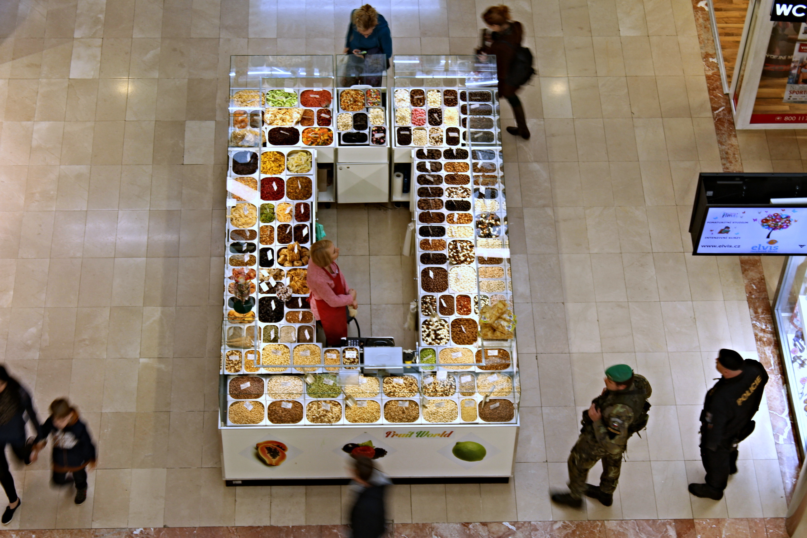 Palác Flora